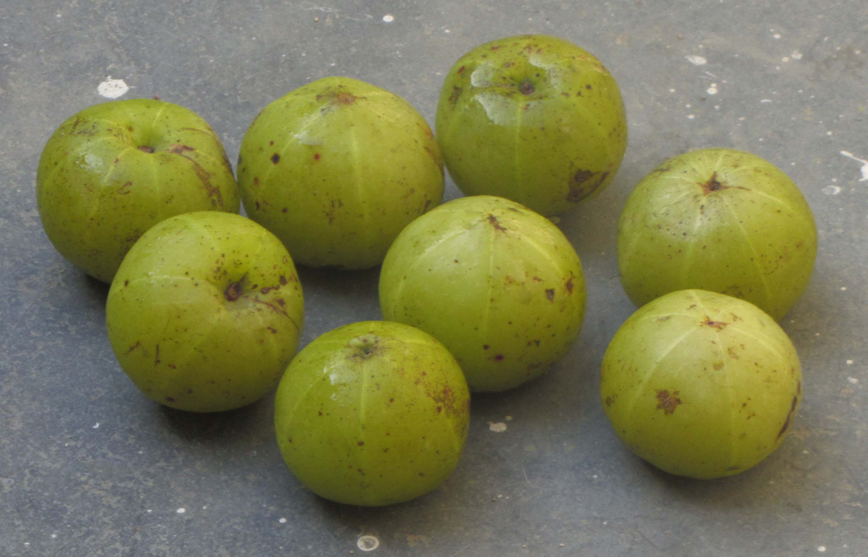 own shot - நெல்லி, பெருநெல்லிக்காய், (அருநெல்லி வேறுவகை), துவர்க்கும். தின்றபின் நீர் பருகின் இனிக்கும். சங்ககாலச் சிறுவர்கள் இதனை வட்டாகப் (கோலிக்குண்டாகப்) பயன்படுத்தி விளையாடிவந்தனர்.